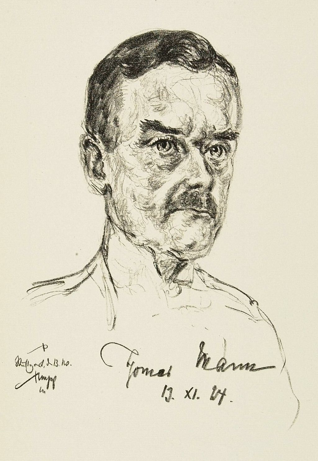 Thomas Mann am 13. 11. 1924. Lithographie von Emil Stumpp, 1924